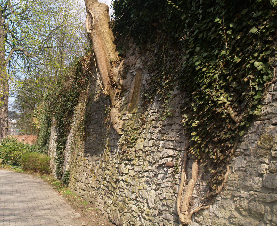 Bielefeld Denkmalnummer 500, Reste der alten Stadtmauer aus dem 16. Jahrhundert